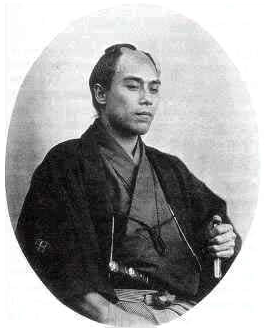 1862년의 후쿠자와 유키치